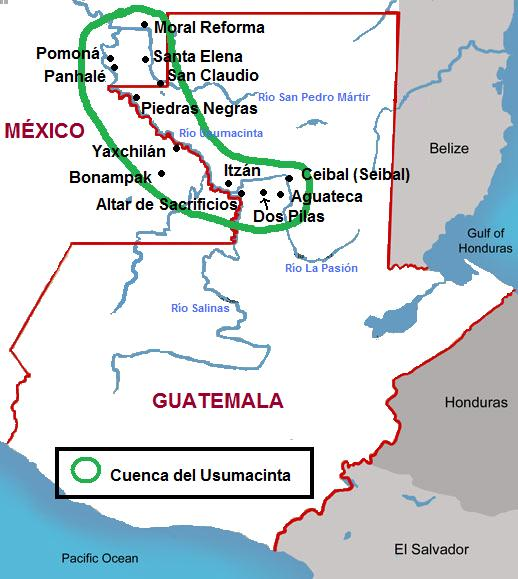 Mapa que muestra la localización de la cuenca del Usumacinta, con las principales ciudades mayas que forman parte de él.